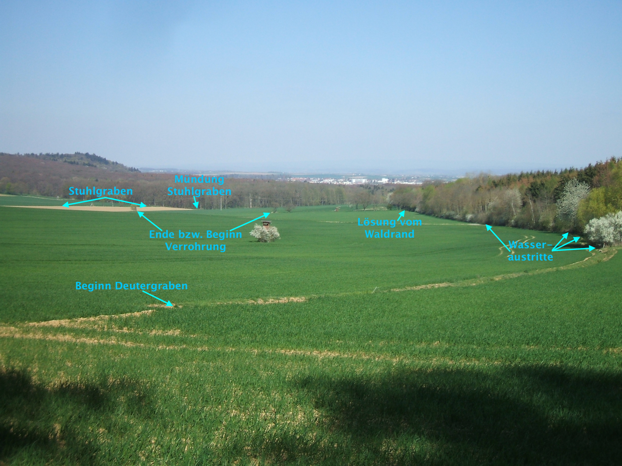 Auf der Alten Wetzlarer Straße stehend: Deutergraben von seinem Beginn bis zur Mündung des Stuhlgrabens, mitten im Hintergrund ist Bad Nauheim, links am Rand der Johannisberg (links außerhalb ist der Eichberg)